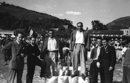 Ignazio Orbegozo "Arriya" (ezkerrean) eta Jeronimo Iturbe "Agiñeta" aizkolariak 1942an